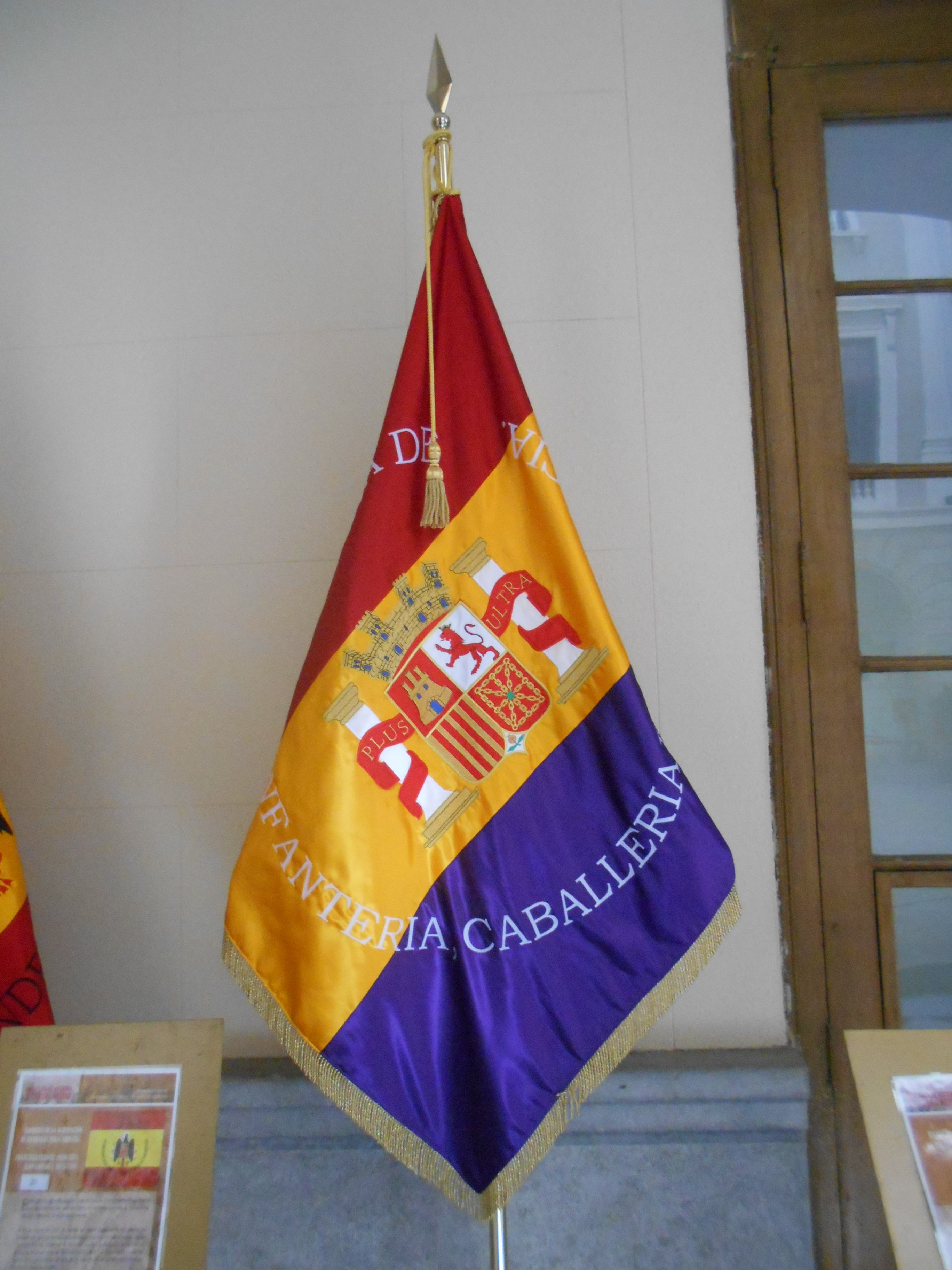 "Bandera de la Academia de Infantería, Caballería e Intendencia. II República, 1931-1939". Instituto de Historia y Cultura Militar. En el Centro de Historia y Cultura Militar Pirenaico (Sala Histórica del Acuartelamiento Gobierno Militar de Barcelona) en Exposición de banderas históricas: "De los Reyes Católicos hasta nuestros días".